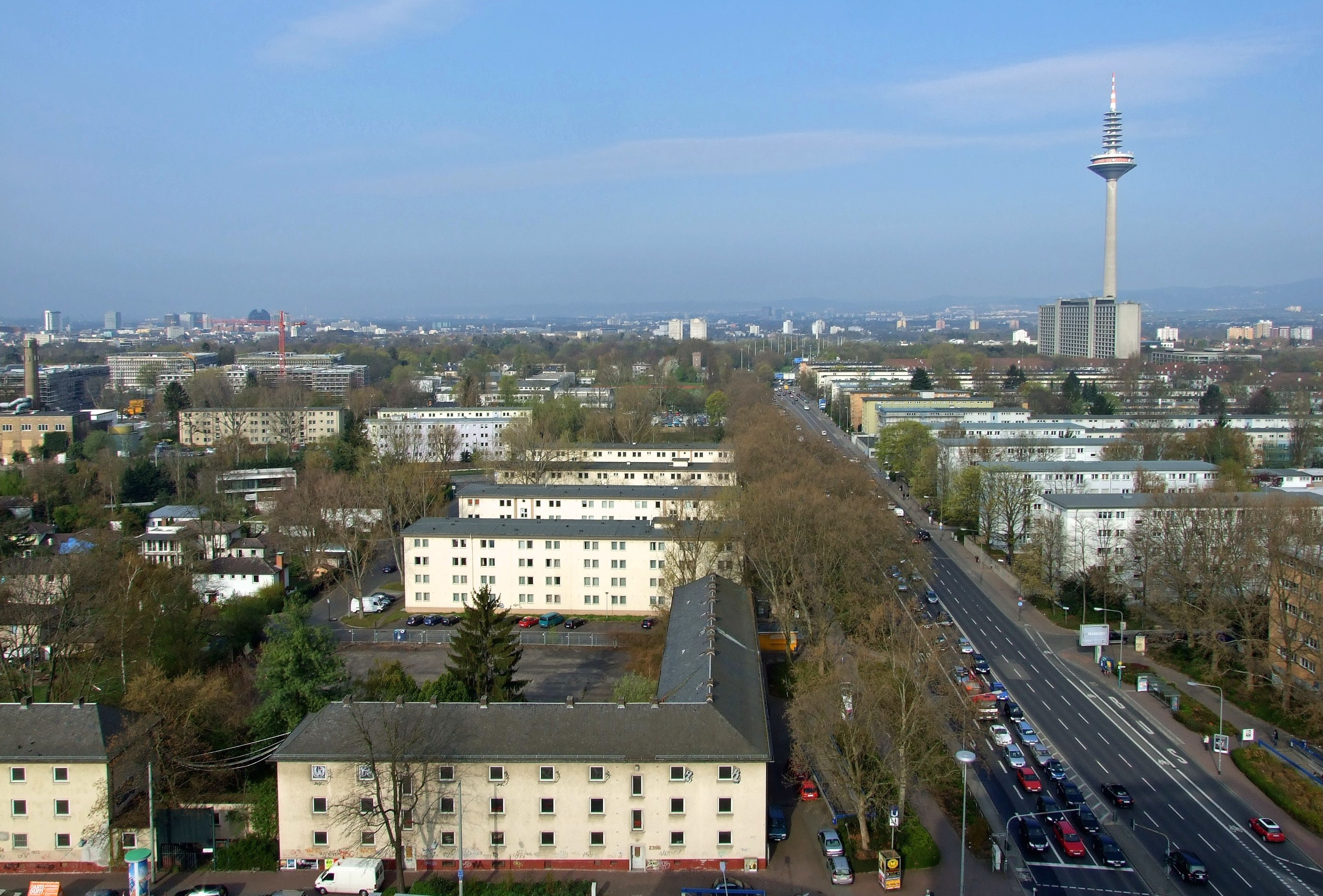 Miquelallee von der Einmündung (Westanschluss) der A66 bis zur Kreuzung Eschersheimer Landstrasse. Der Anfang der Miquelallee befindet sich links hinter Campus Westend sowie dem Palmen- und dem Botanischen Garten, etwa in der Flucht des Baukranes.